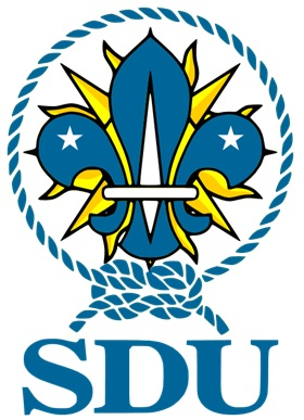 Flor de Lis de Scouts de Uruguay, es la Flor de Lis de tres pétalos de color azul claro, sujeta por una cinta blanca, cerca del extremo inferior. Detrás de la cinta y en el medio del pétalo mayor esta un romo alargado, blanco. En los pétalos laterales lleva una estrella blanca de cinco puntas. Detrás de la Flor de Lis esta un sol amarillo con los rayos, similar al sol del Pabellón Nacional. Rodeando todo el conjunto, una cuerda con los extremos atados abajo con un nudo rizo.